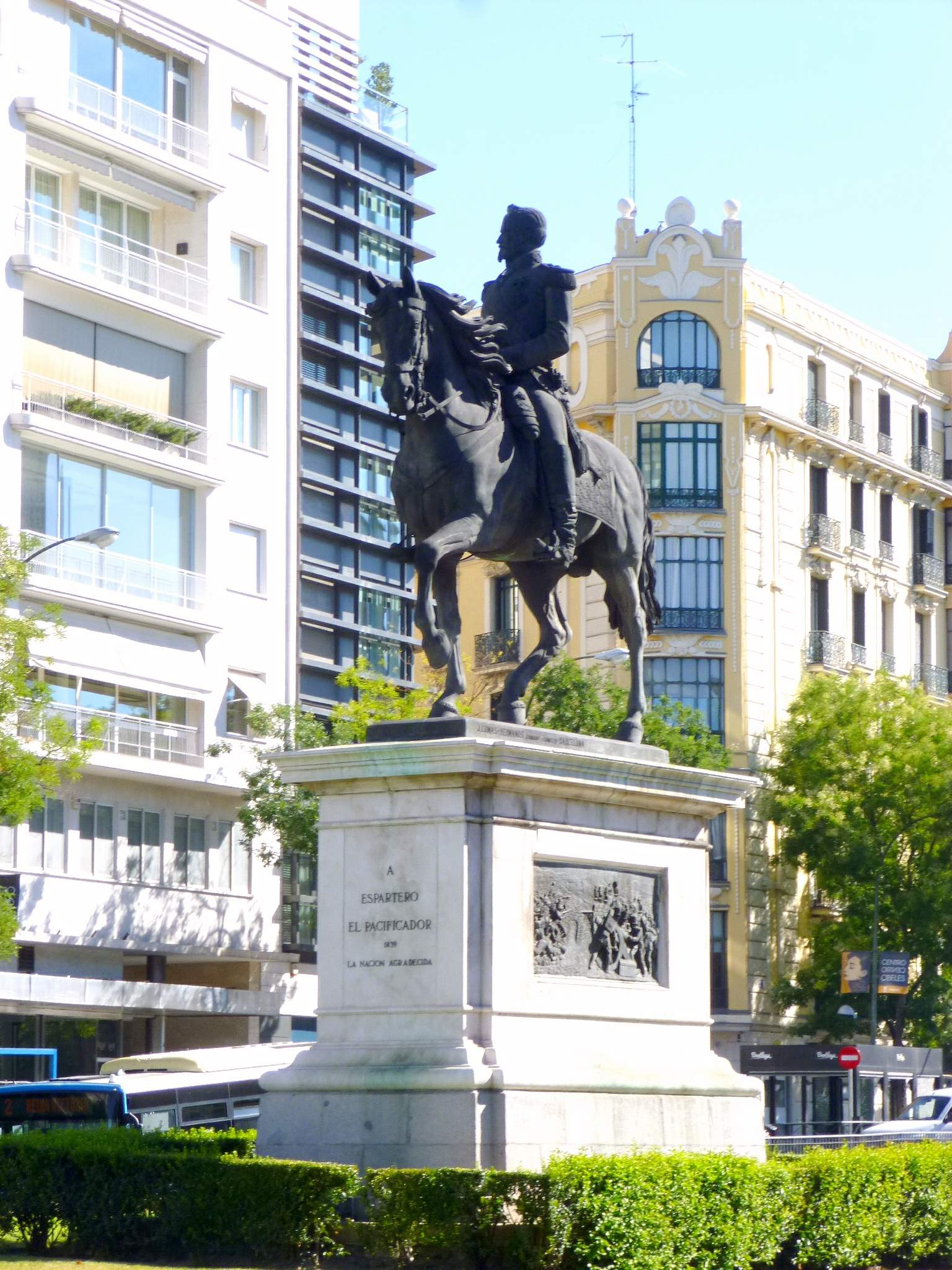 Monumento a Espartero (Madrid)